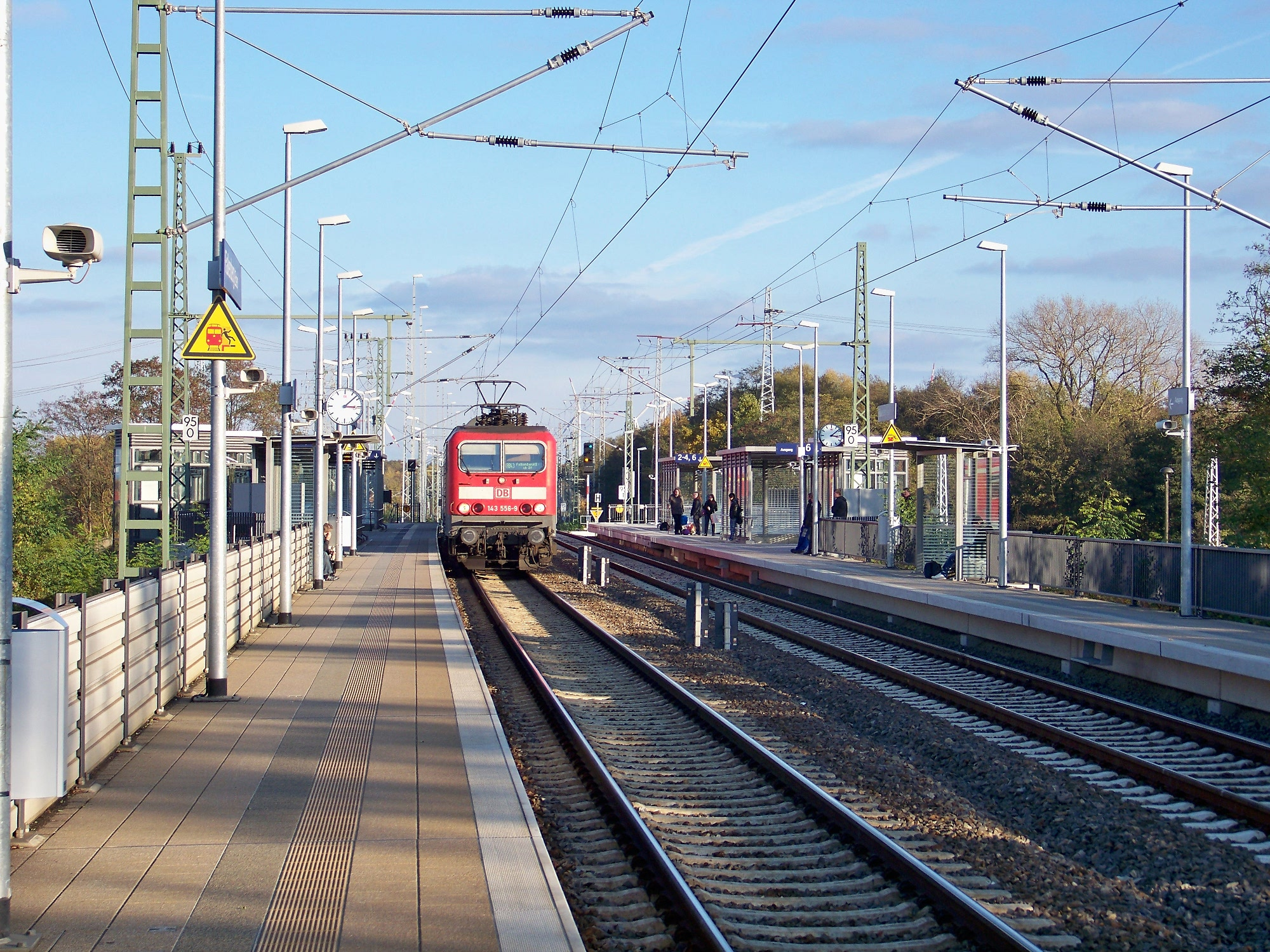 DB 143 556 mit einfahrender Regionalexpress 10 aus Cottbus in Falkenberg (Elster) Oberer Bahnhof